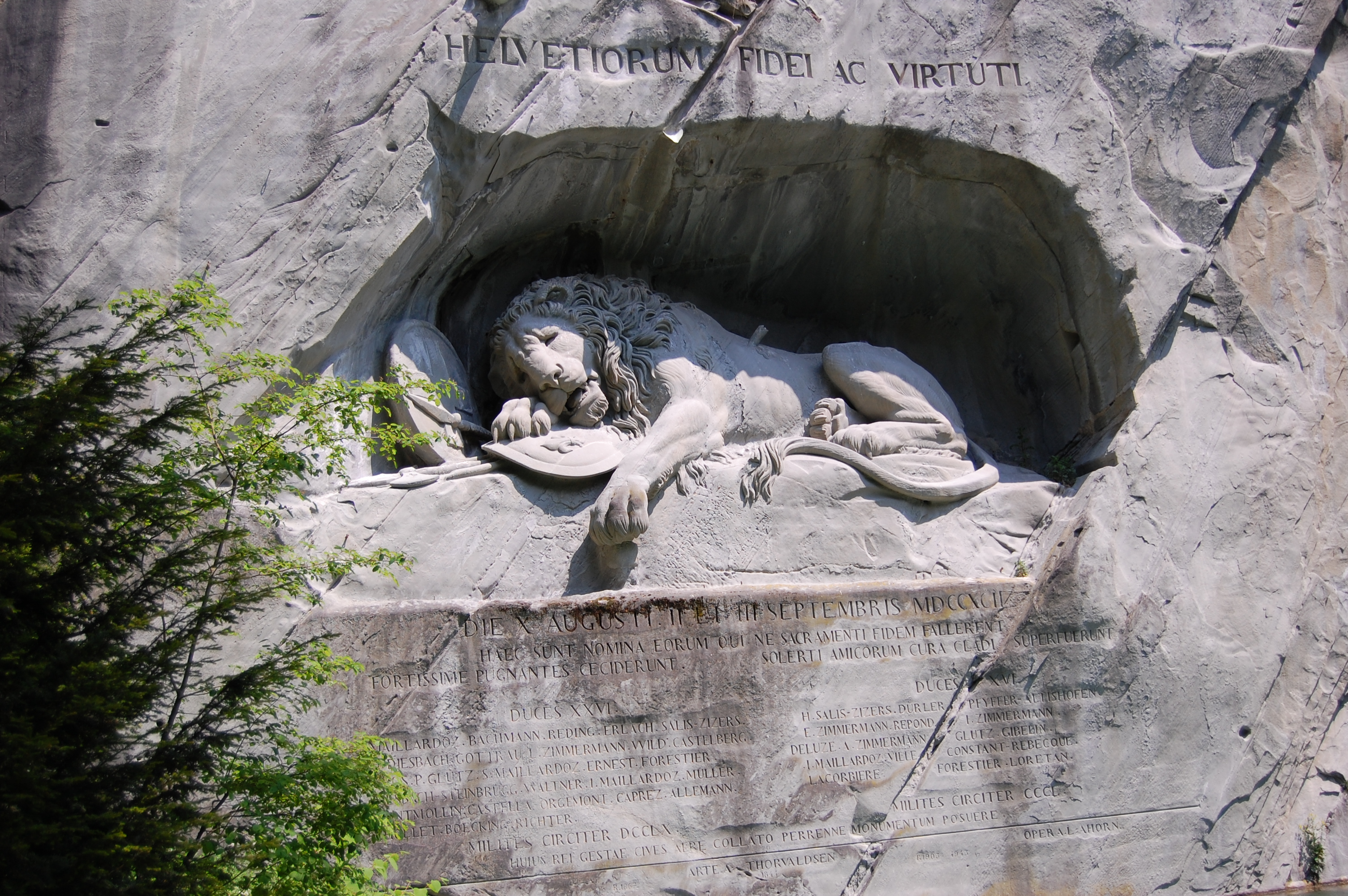 Lowendenkmal